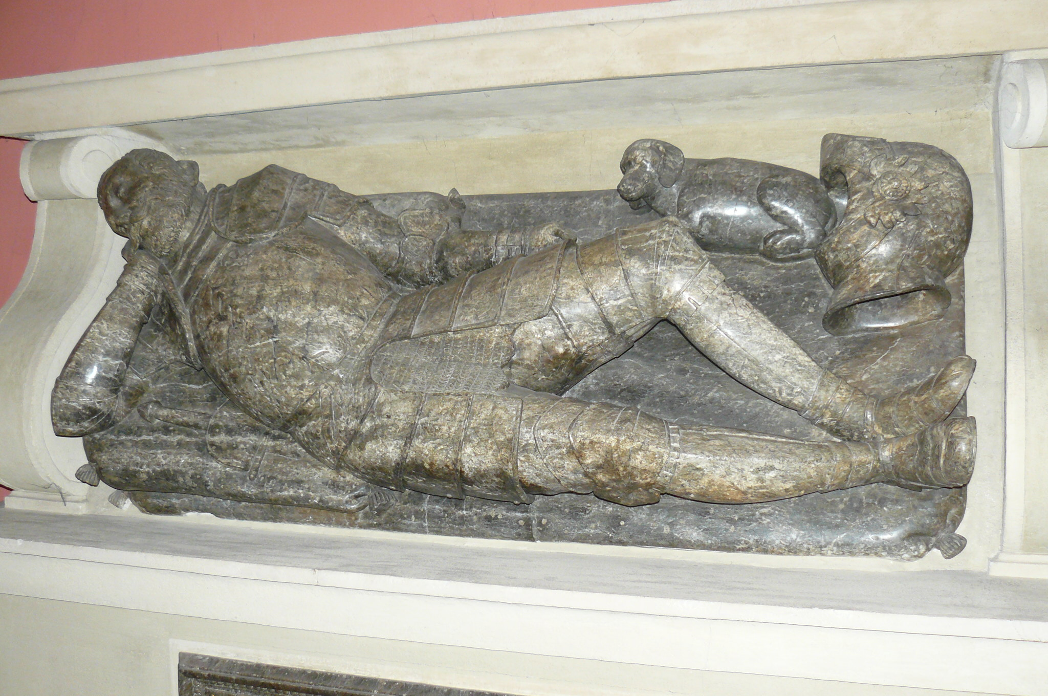 Nagrobek Andrzeja Górki II w kościele w Kórniku.